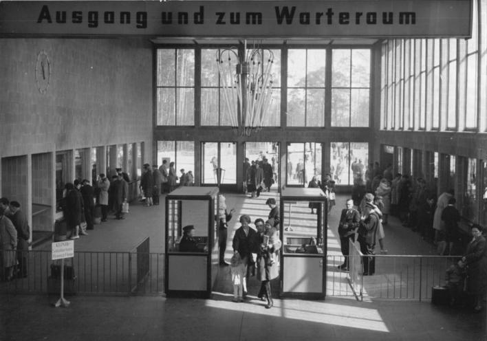 Zentralbild-Brüggmann Kr-Ki. 06.4.1963 In der Halle des Hauptbahnhofes Potsdam herrscht reges Leben. Bis zu 10000 Reisende werden täglich auf dem neuerbauten Hauptbahnhof Potsdam abgefertigt. Dieser Bahnhof entwickelte sich in den letzten Jahren zu einem wichtigen Schnittpunkt im Reiseverkehr. So können jetzt schon Reisende von Potsdam aus z.B. nach Stralsund, Rostock, Karl-Marx-Stadt oder Magdeburg u.a. Städte fahren. Bis Ende 1963 soll mit den letzten Arbeiten an dem modernen Bahnhof abgeschlossen werden.